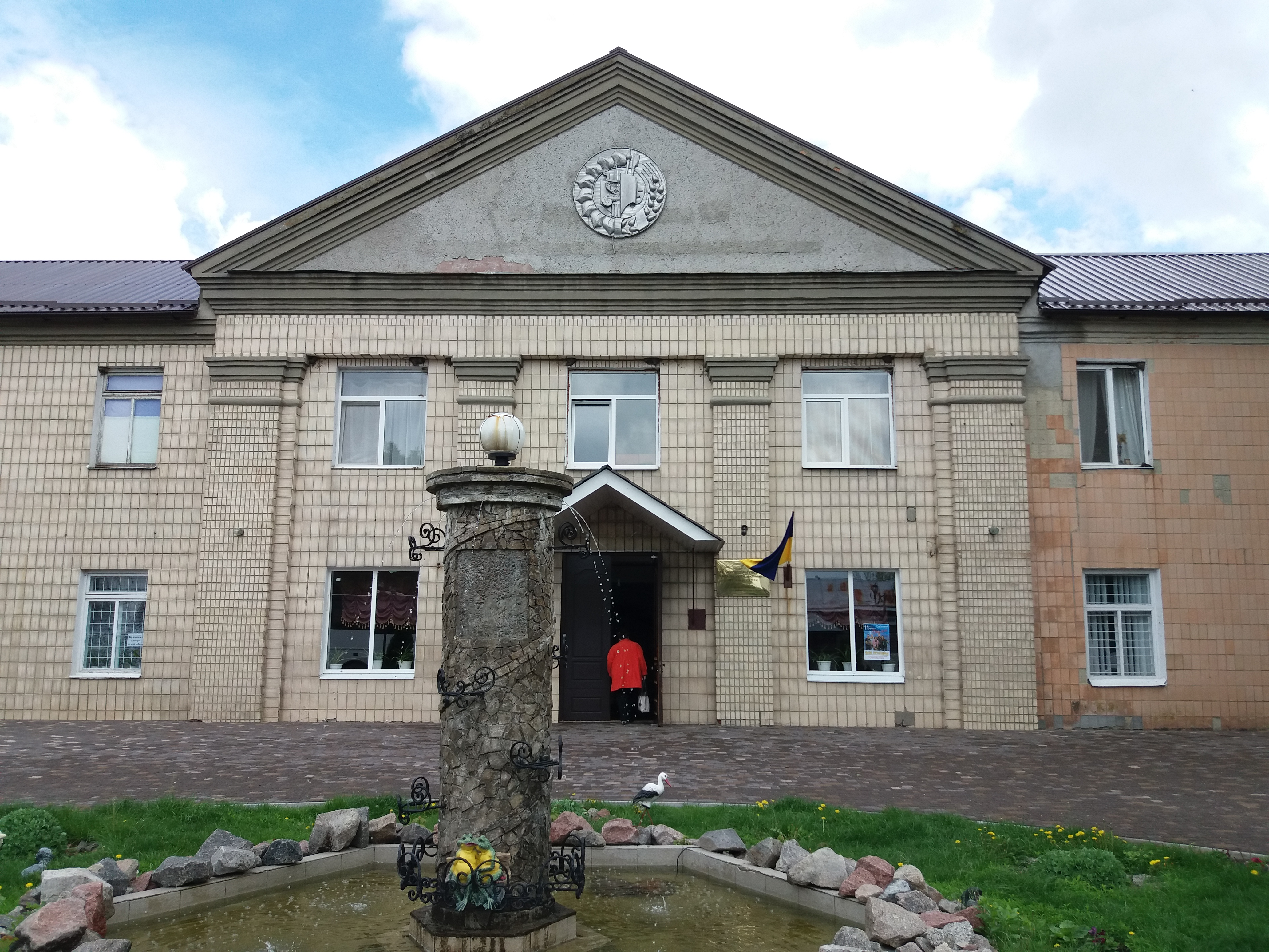 Будинок культури у селі Великі Будища Диканського району Полтавської області